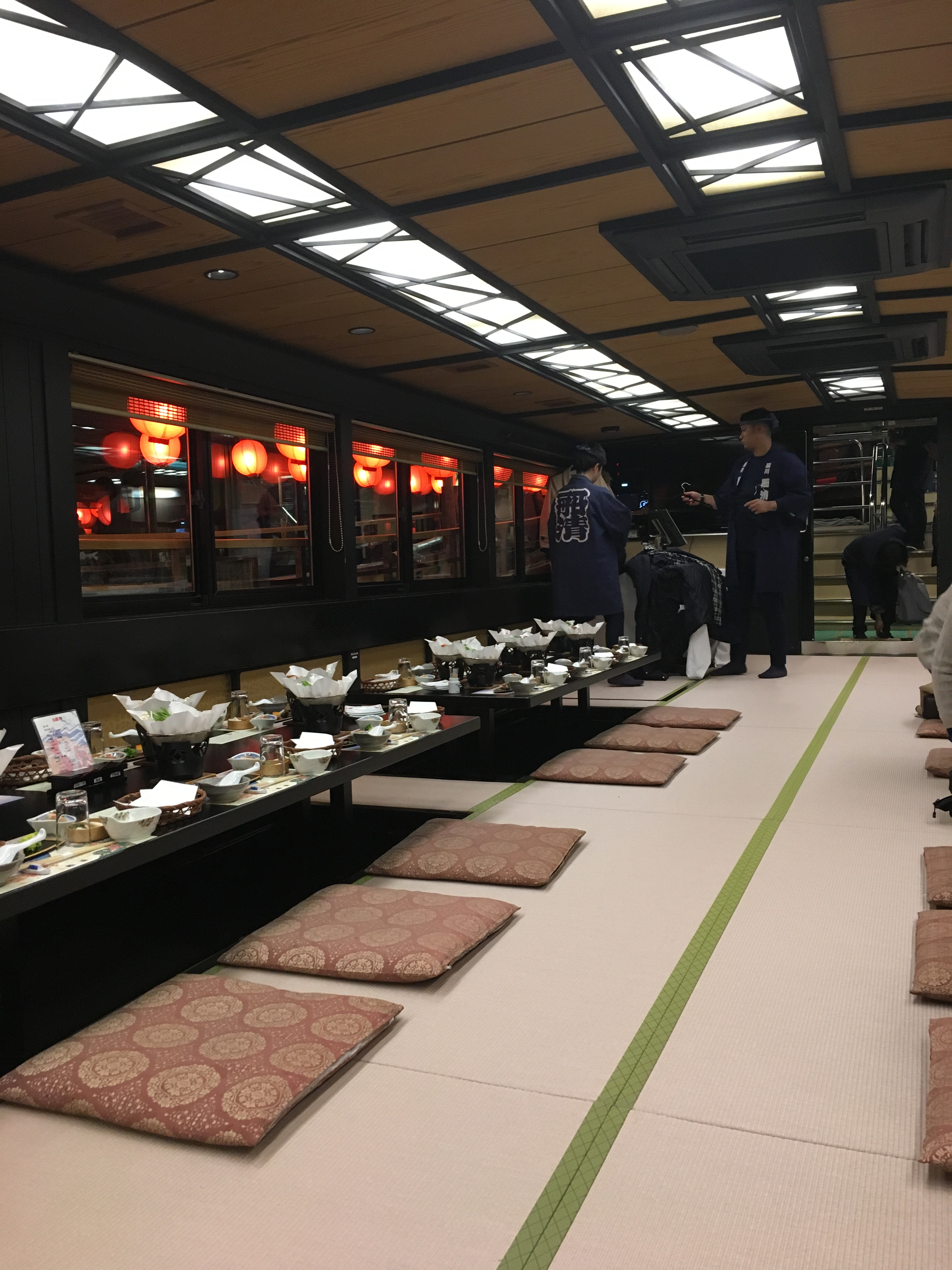 屋形船の中 (inside a yakatabune)